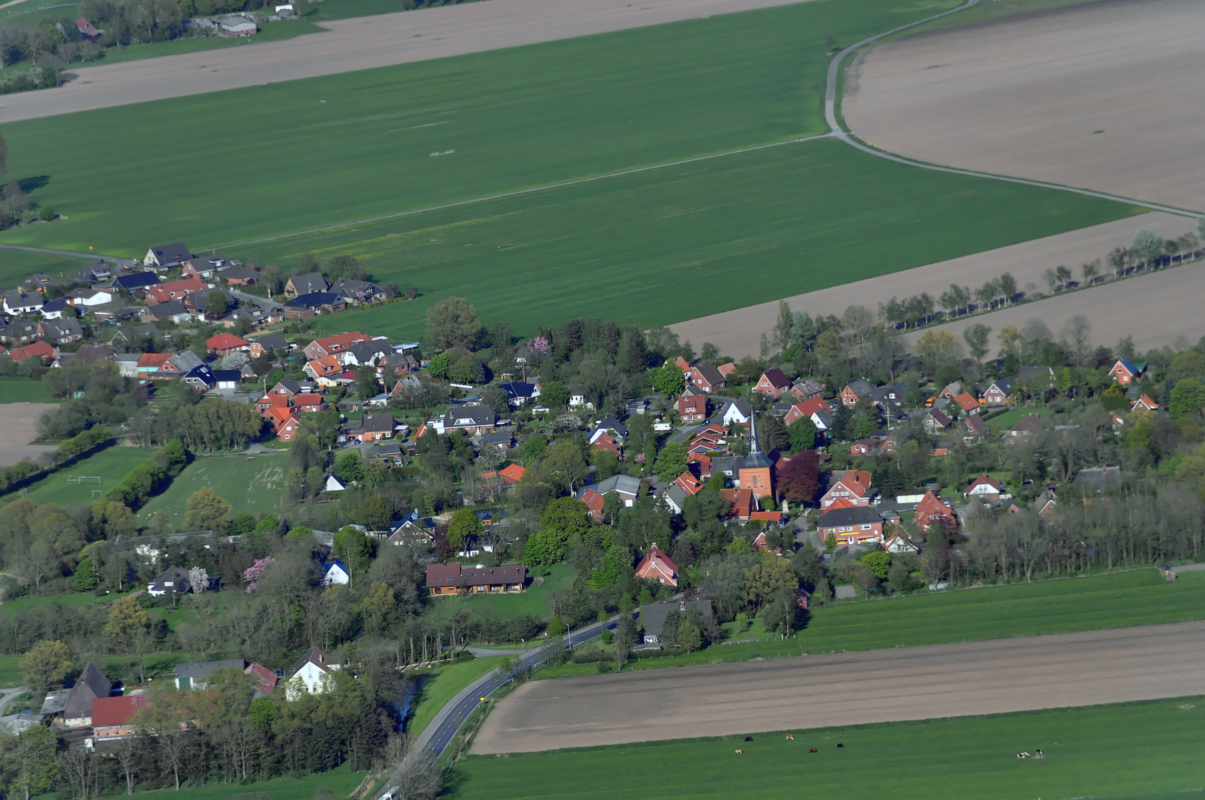 Luftbilder von der Nordseeküste 2012-05